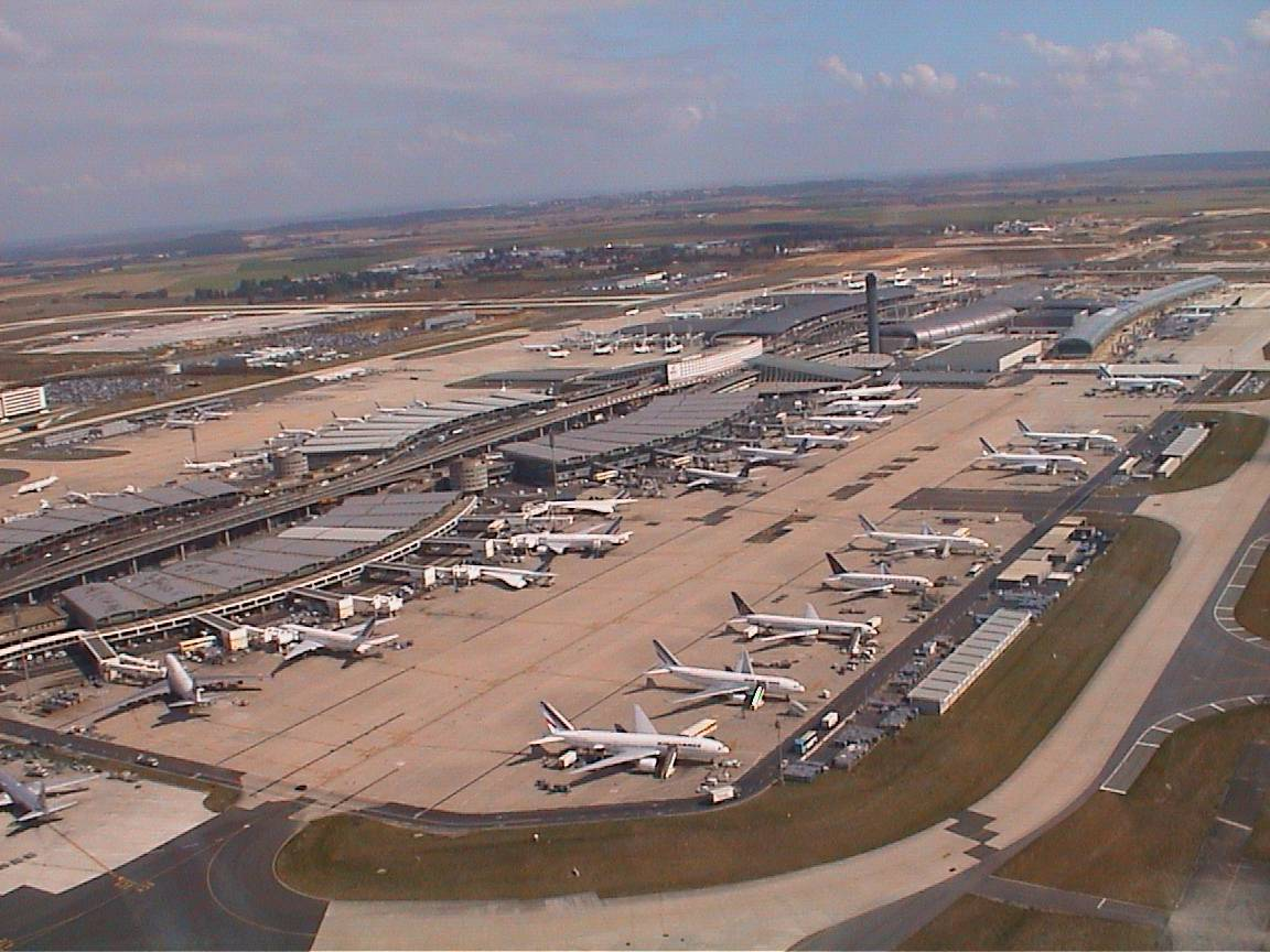 Vue du Terminal 2 de l'aéroport de Paris-Charles-de-Gaulle